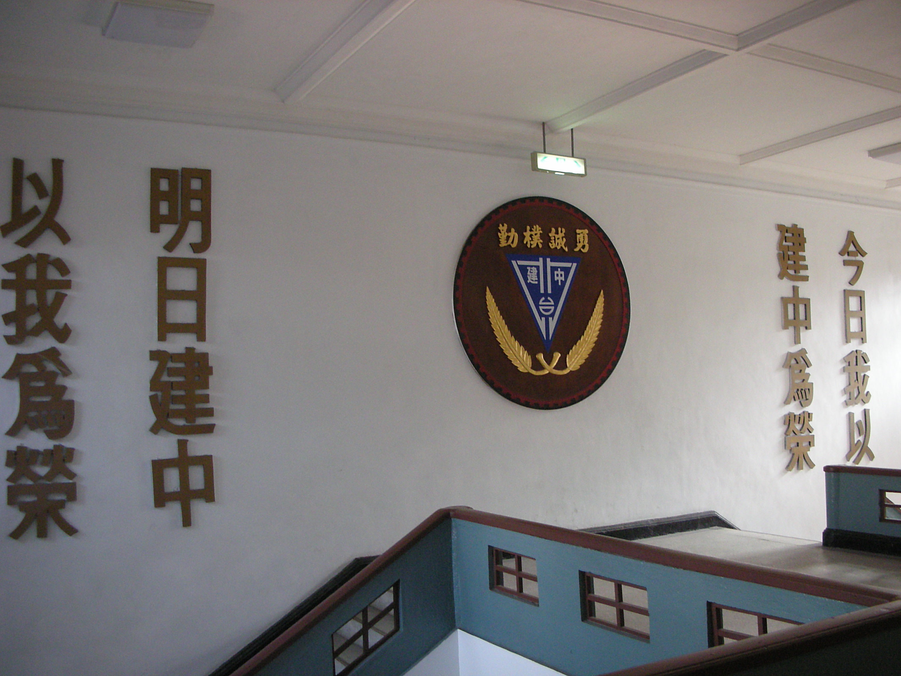 建國中學校徽與校訓、標語，位於紅樓二樓，校長室前.